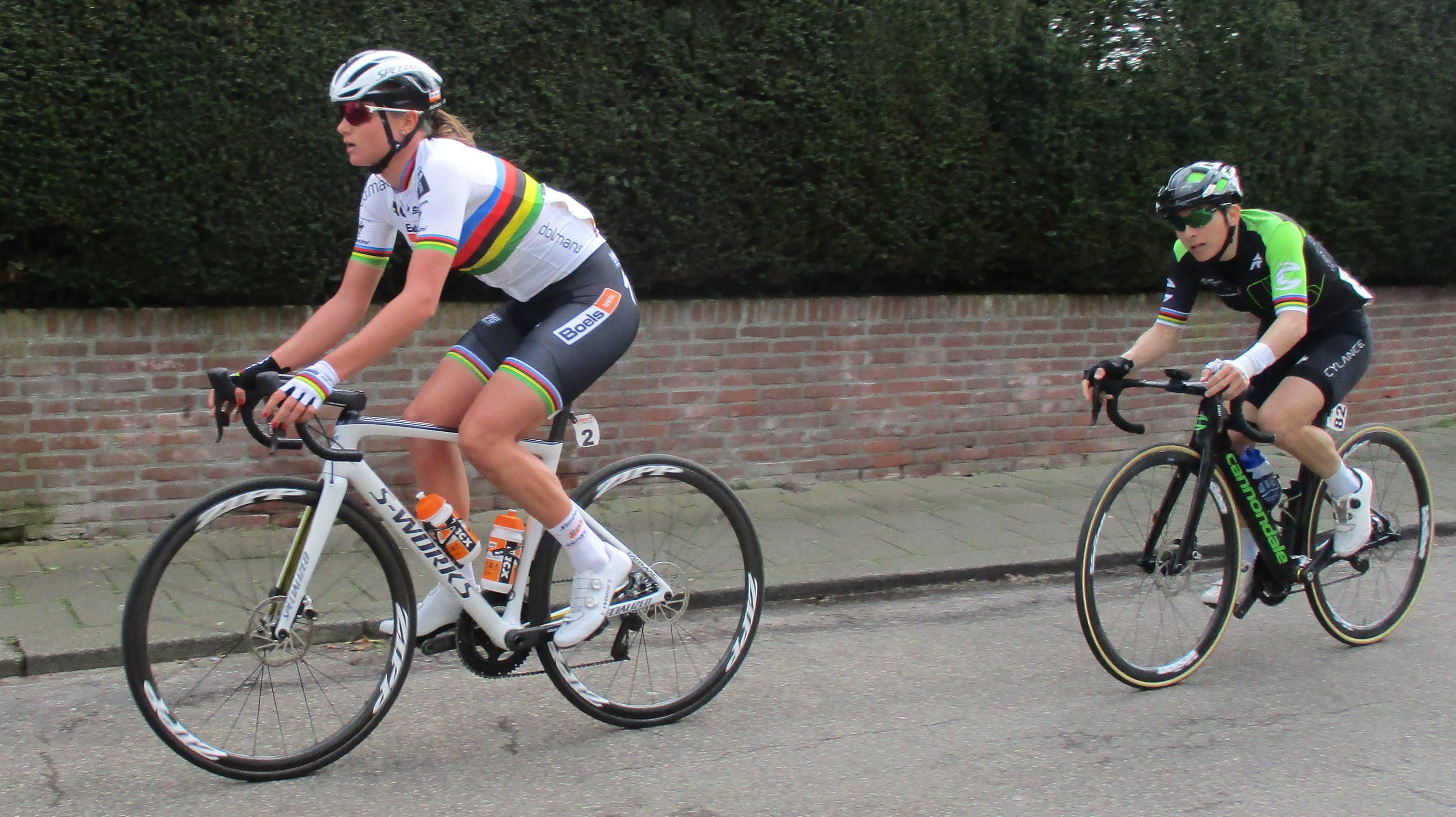 2e beklimming Geulhemmerberg in de Amstel Gold Race Ladies Edition 2018.